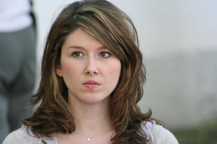 Jewel Staite